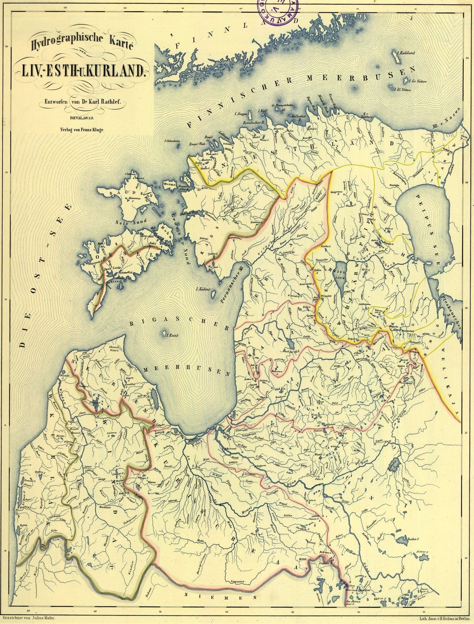 Hydrographische Karte von Liv-, Esth- u. Kurland.